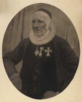 Jens Paludan-Müller (07.11.1771-14.05.1845), dansk biskop